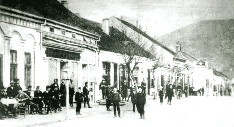 Srpski (latinica): Oslobođena Kuršumlija u Topličkom ustanku 1917.